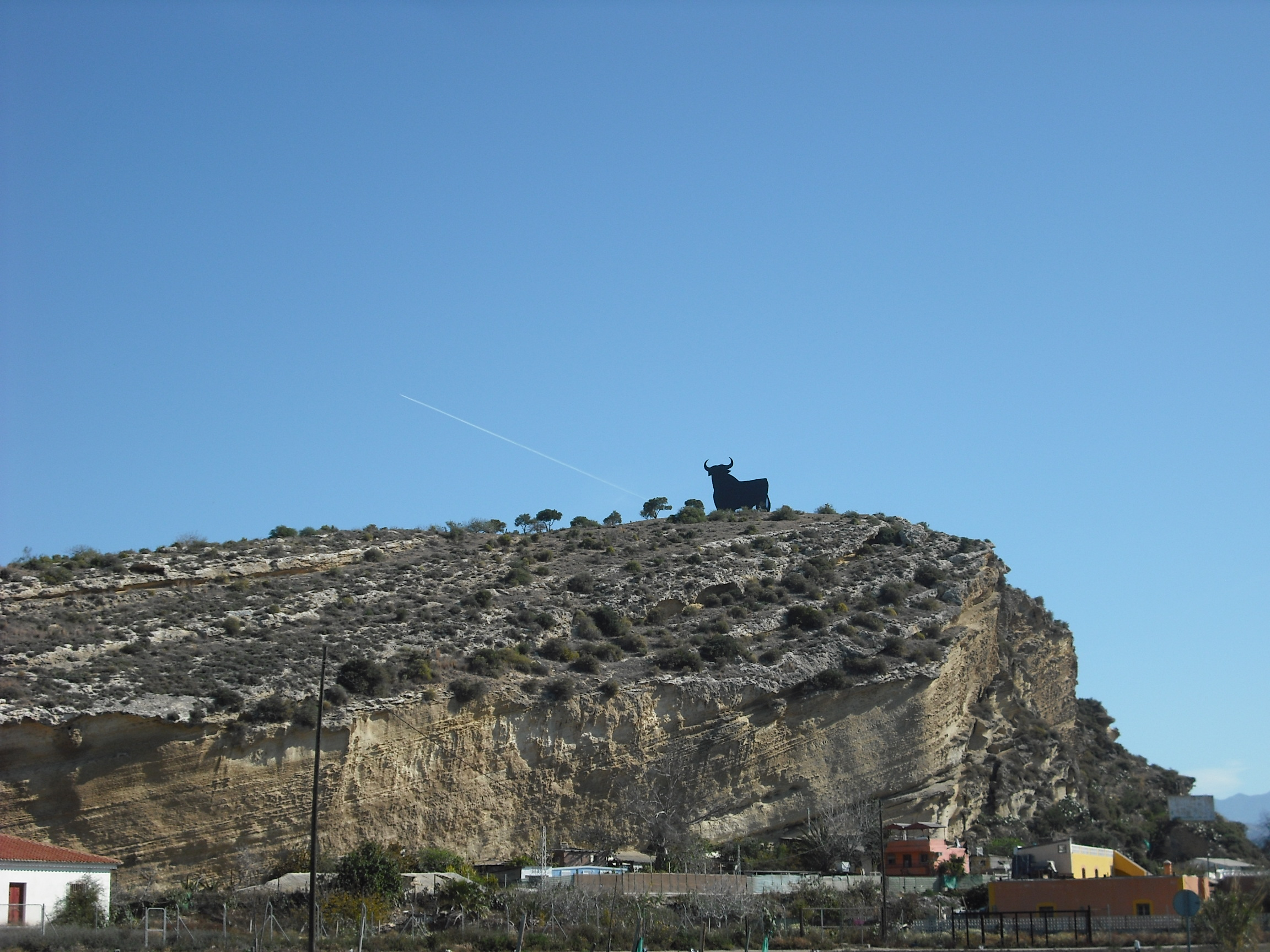 Toscanos, Cerro del Peñón, Cerro Alarcón, Cerro del Mar y Necrópolis de Jardín